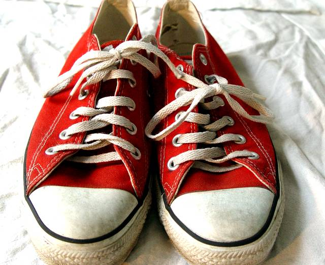 Boarisch: Leinenschuah mit Gummitei.